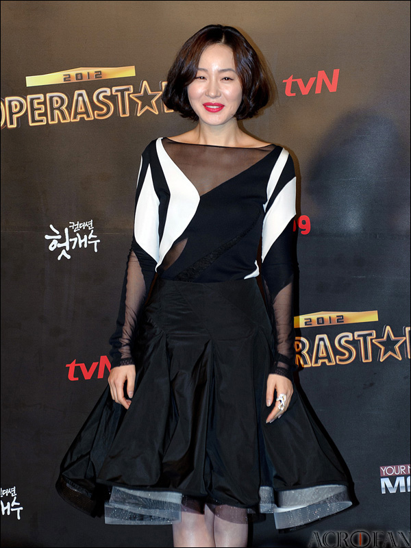 tvN 오페라스타 2012 제작 발표회에 참여한 엄지원